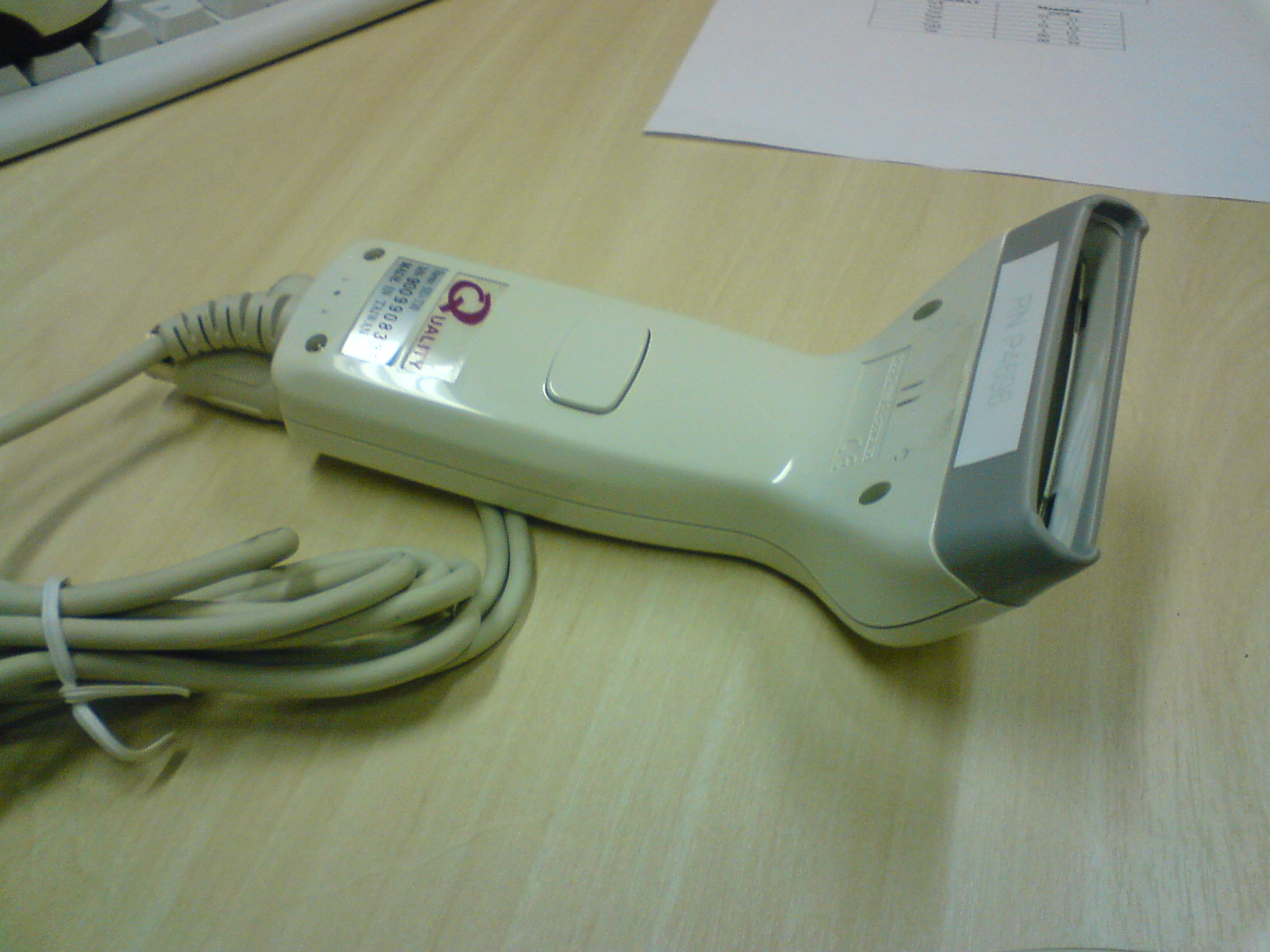 A barcode hand scanner (scanner de mão para código de barras)